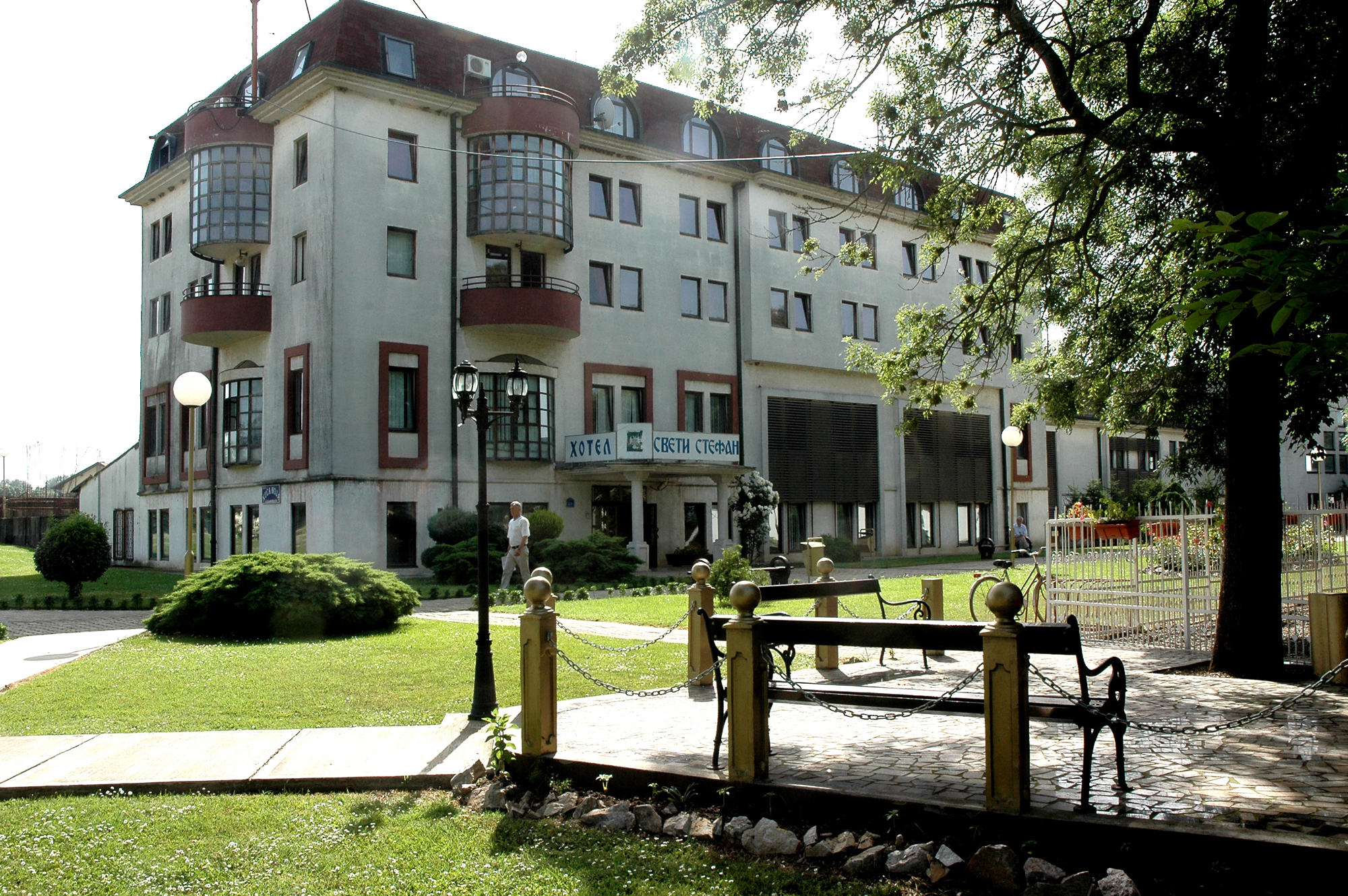 Парк природе Бања Дворови са околином, Бијељина ID добра: PPP003